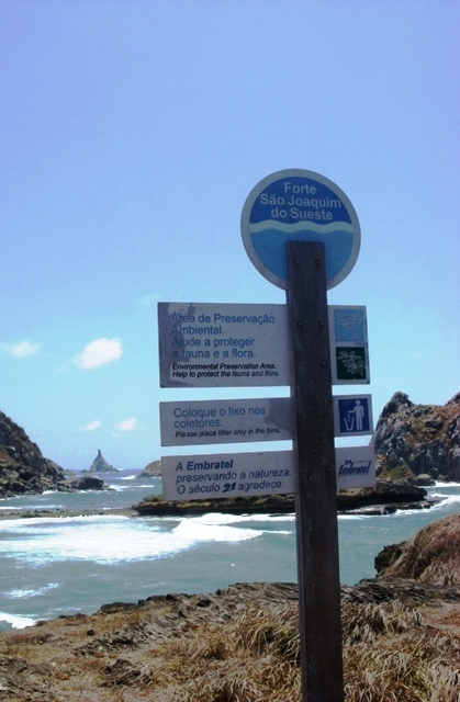 Placa indicativa do Forte de São Joaquim do Sueste, Ilha de Fernando de Noronha, Brasil.